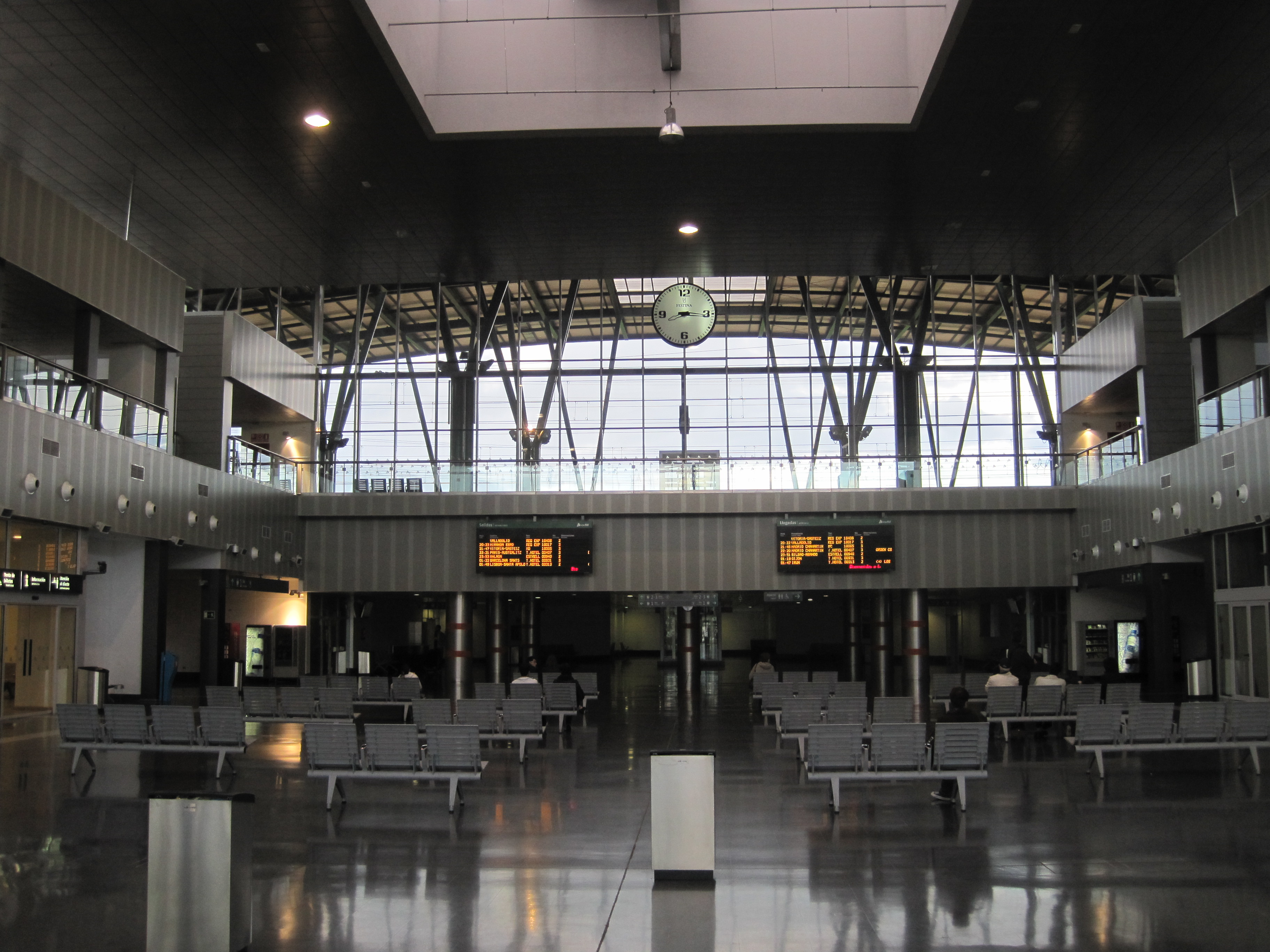 Vista del recibidor principal de la estación de trenes de Burgos.